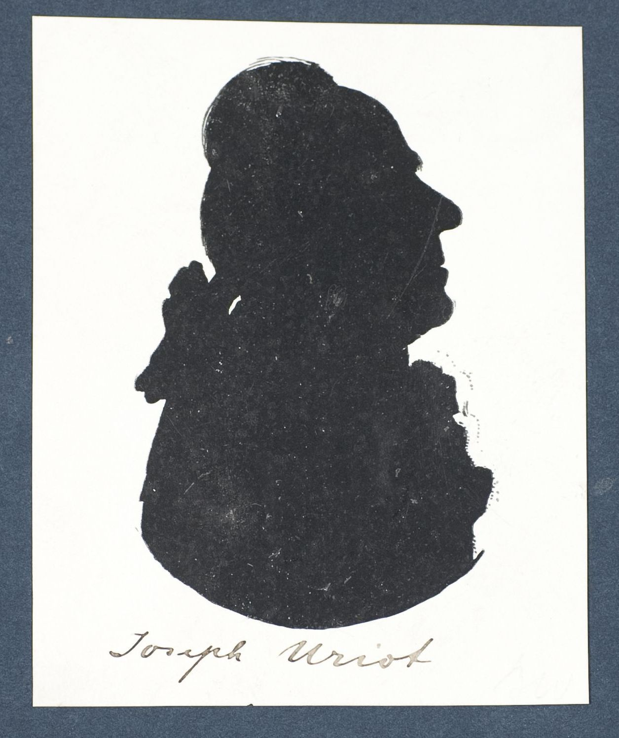 Schattenriss Porträt Joseph Uriot